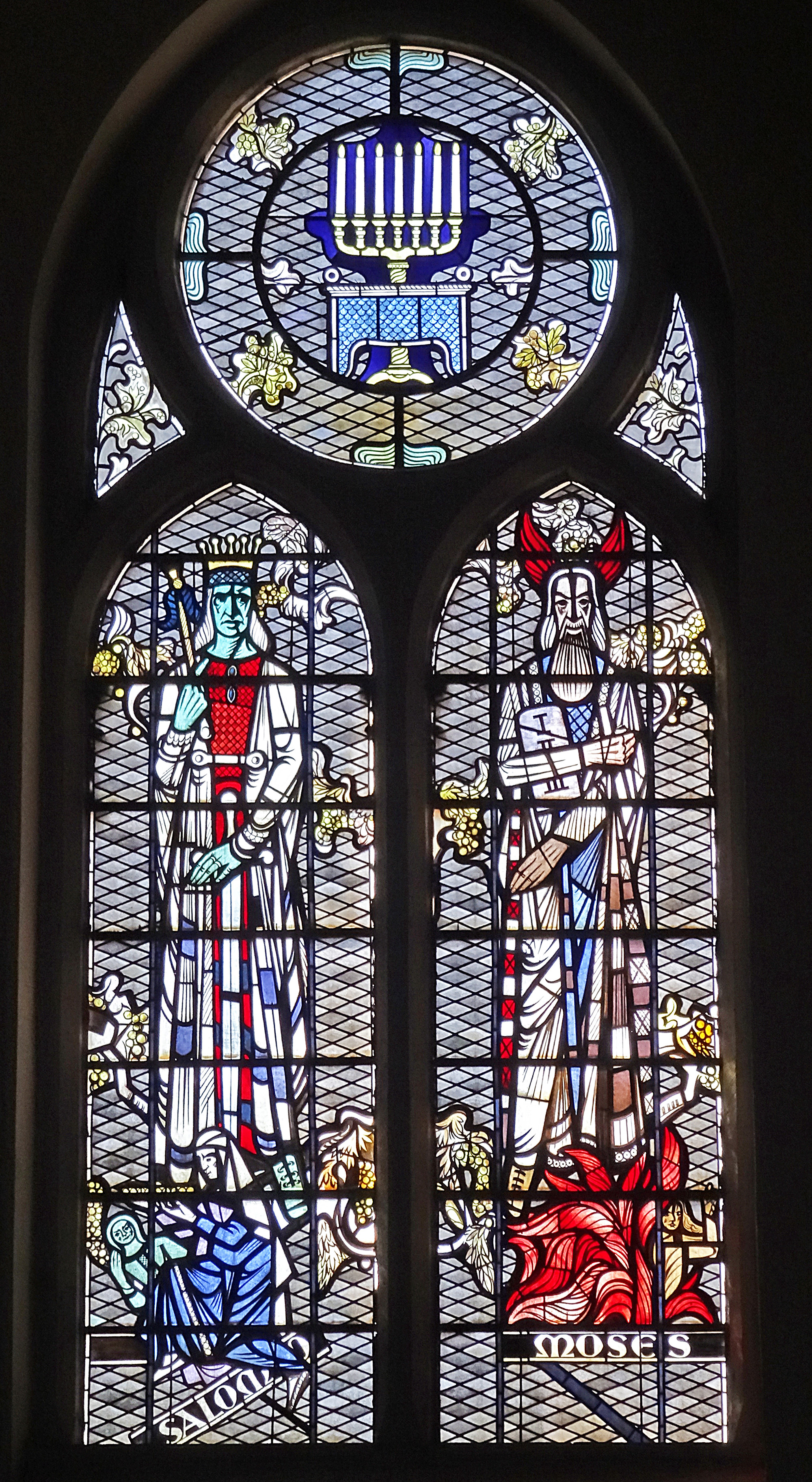 Westfenster II von Karl Völker in der Thomaskirche zu Erfurt